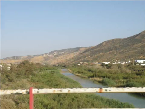 Chelif - Wilaya de Mostaganem - Algérie